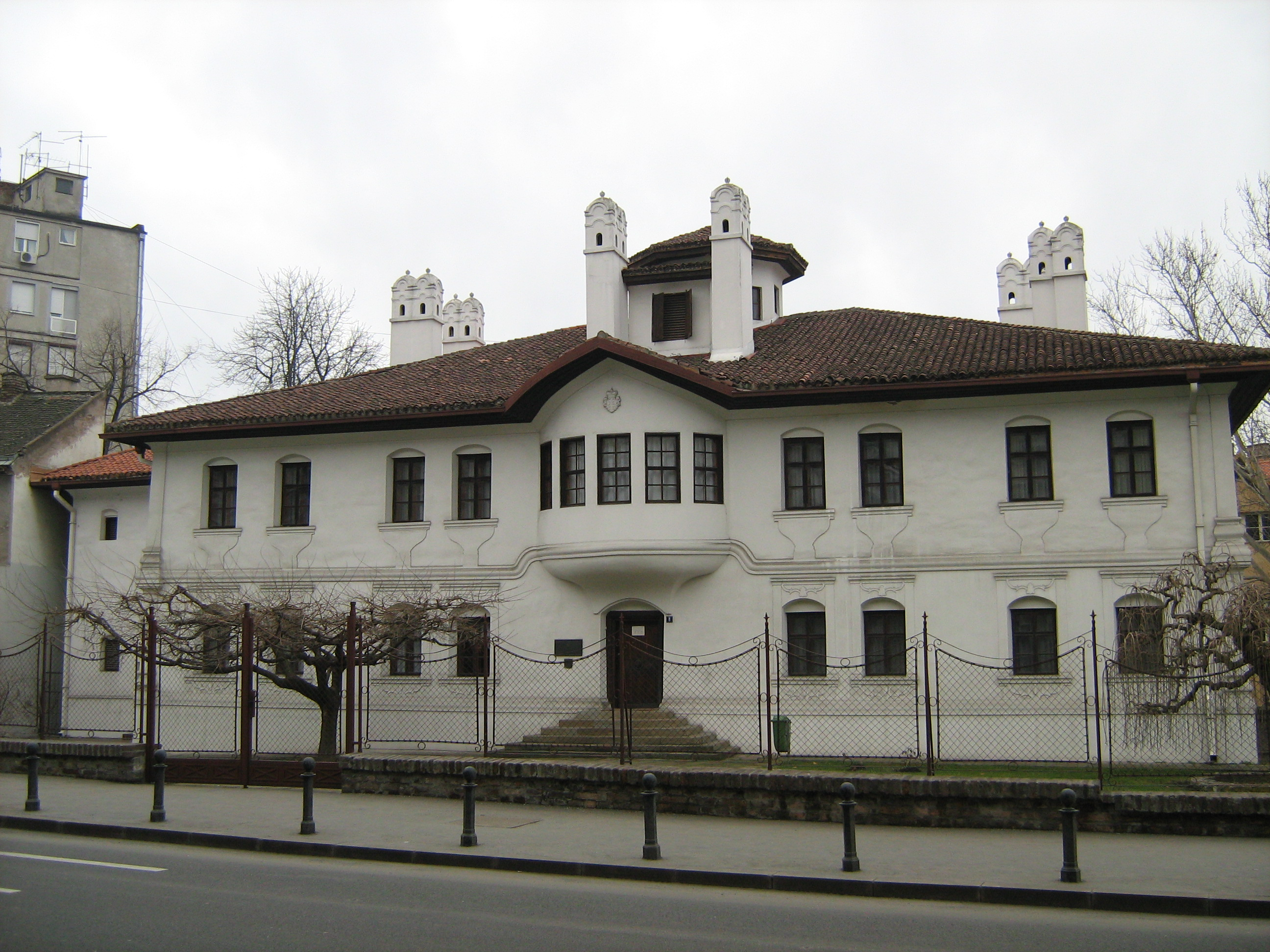 Countess Ljubica's Residence